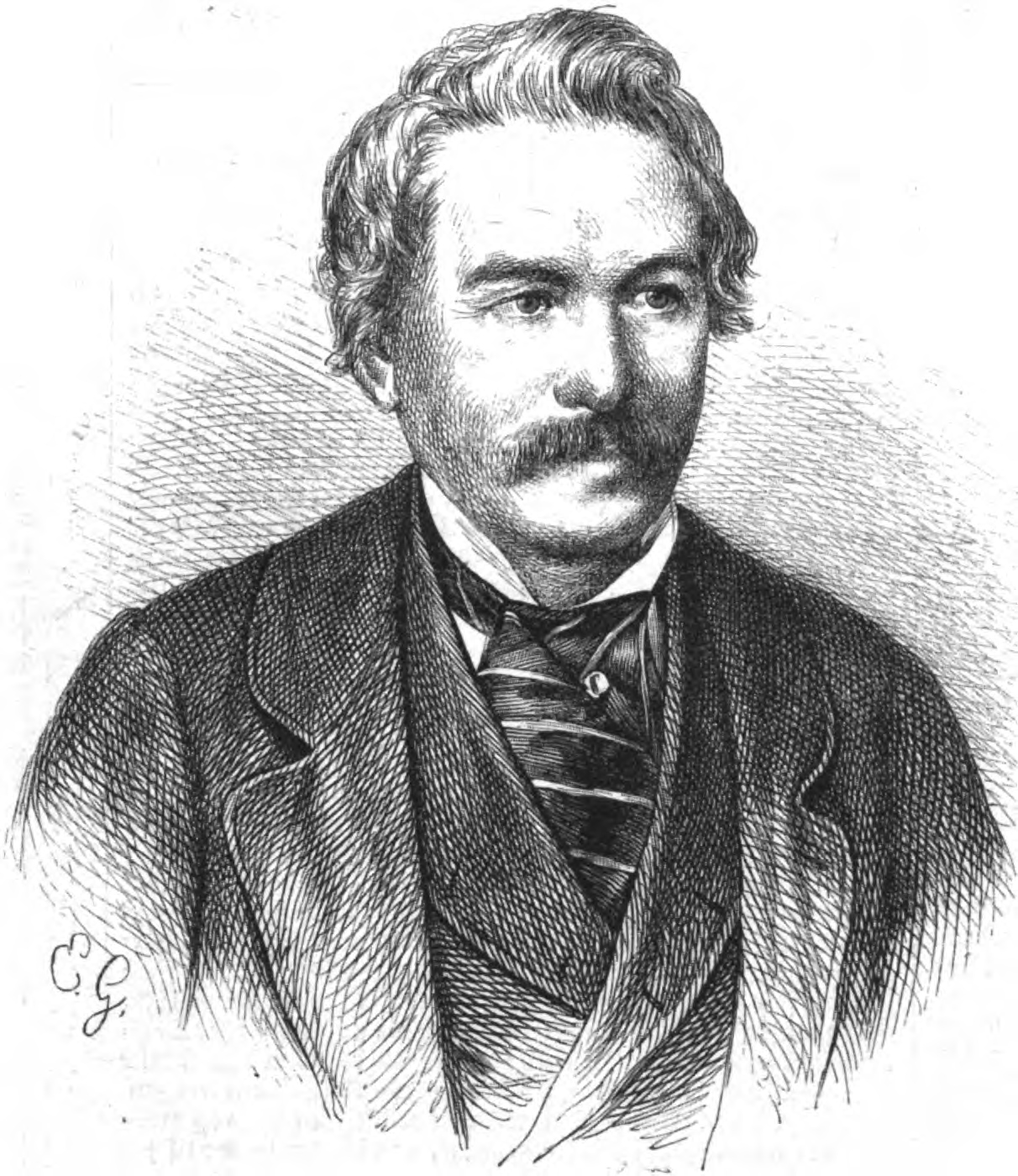 Robert Schomburgk, deutscher Forschungsreisender im 19. Jh.